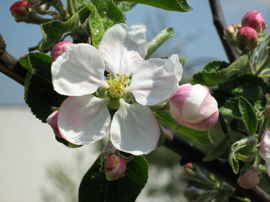 Jabłoń Matsumury (Malus asiatica Nakai) z mojego ogrodu